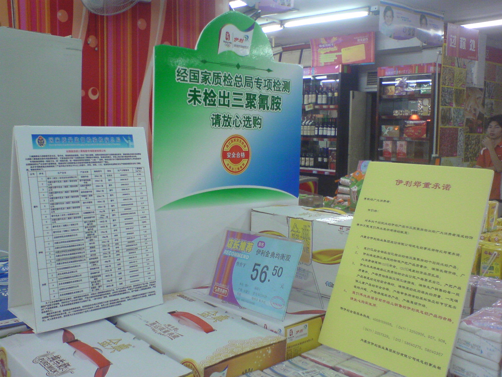 2008年三鹿奶粉污染事件发生后，中国超级市场内的牛奶销售区域都放上由厂商印制的“未验出三聚氰胺”提示及政府的化验报告。